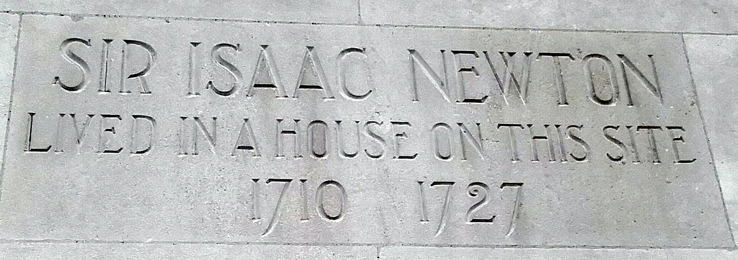 Памятная табличка в Лондоне на улице, где жил И. Ньютон с 1710 по 1727 г